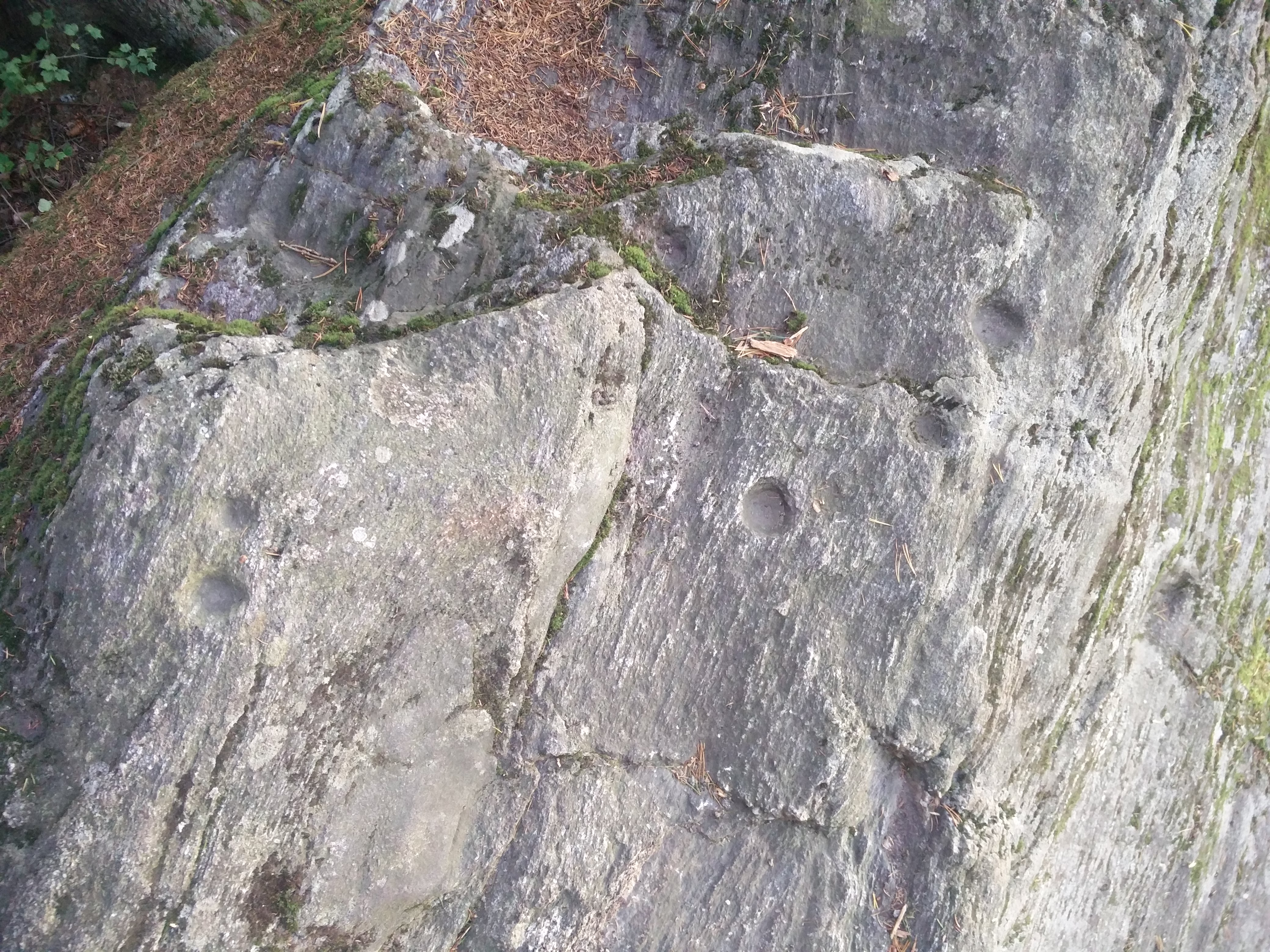 Kuppikivi Herrasmanni, Lahti